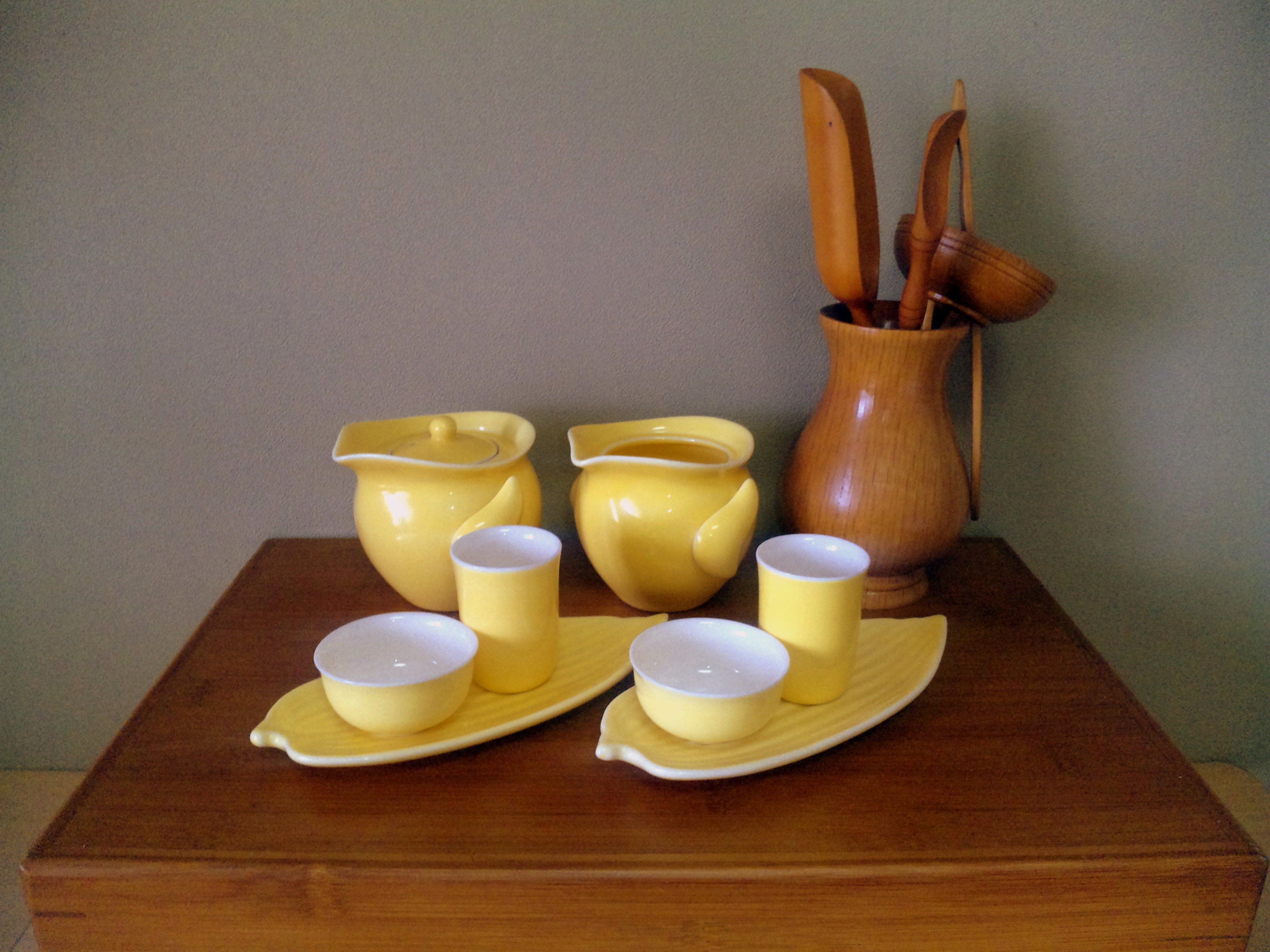 静葉所有の中国茶の茶器の一例。これだけあれば工夫茶を充分楽しむことができる。